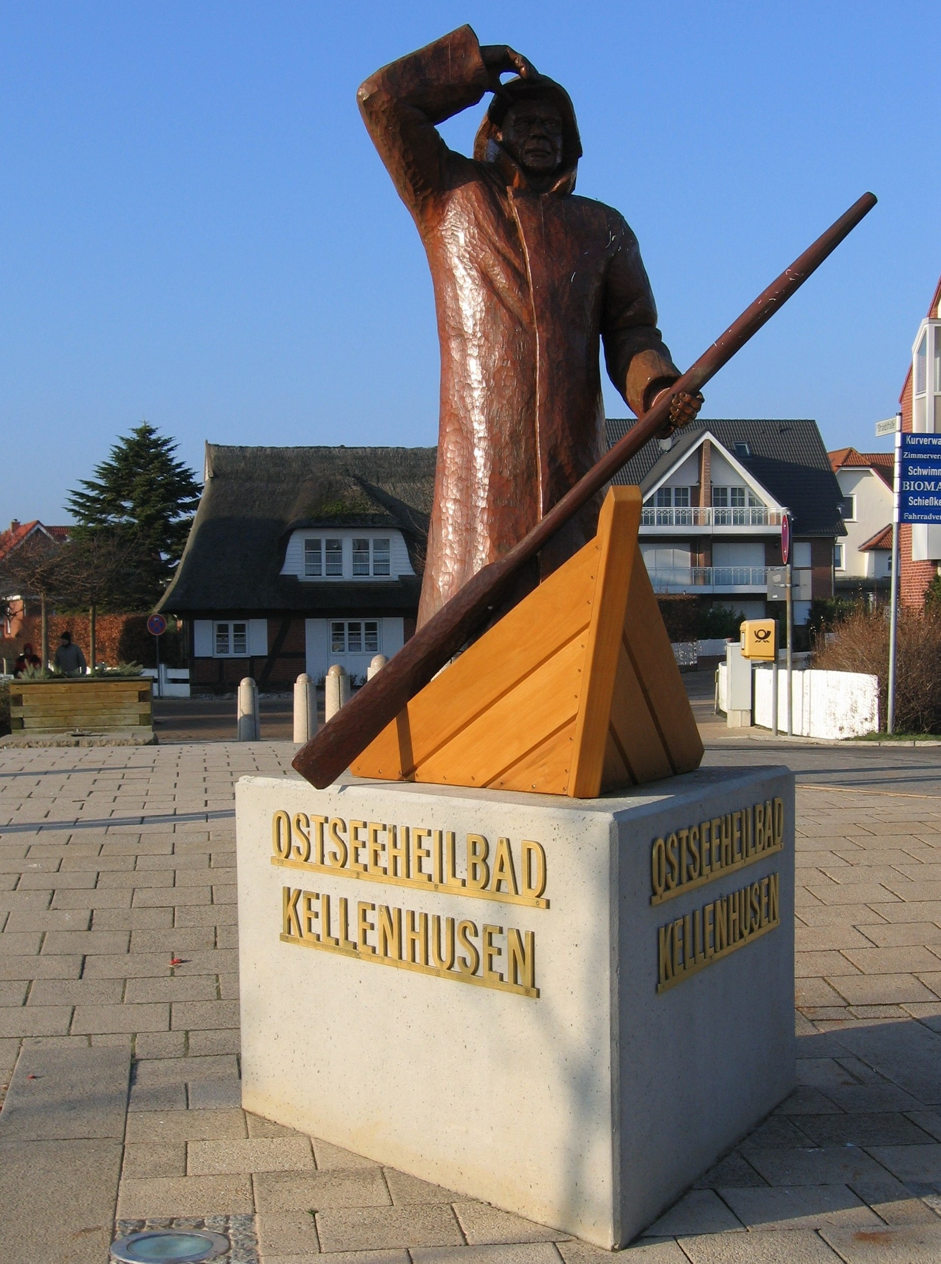 Kellenhusen ,,Fischer", von Holzschnitzer Axel Süphke